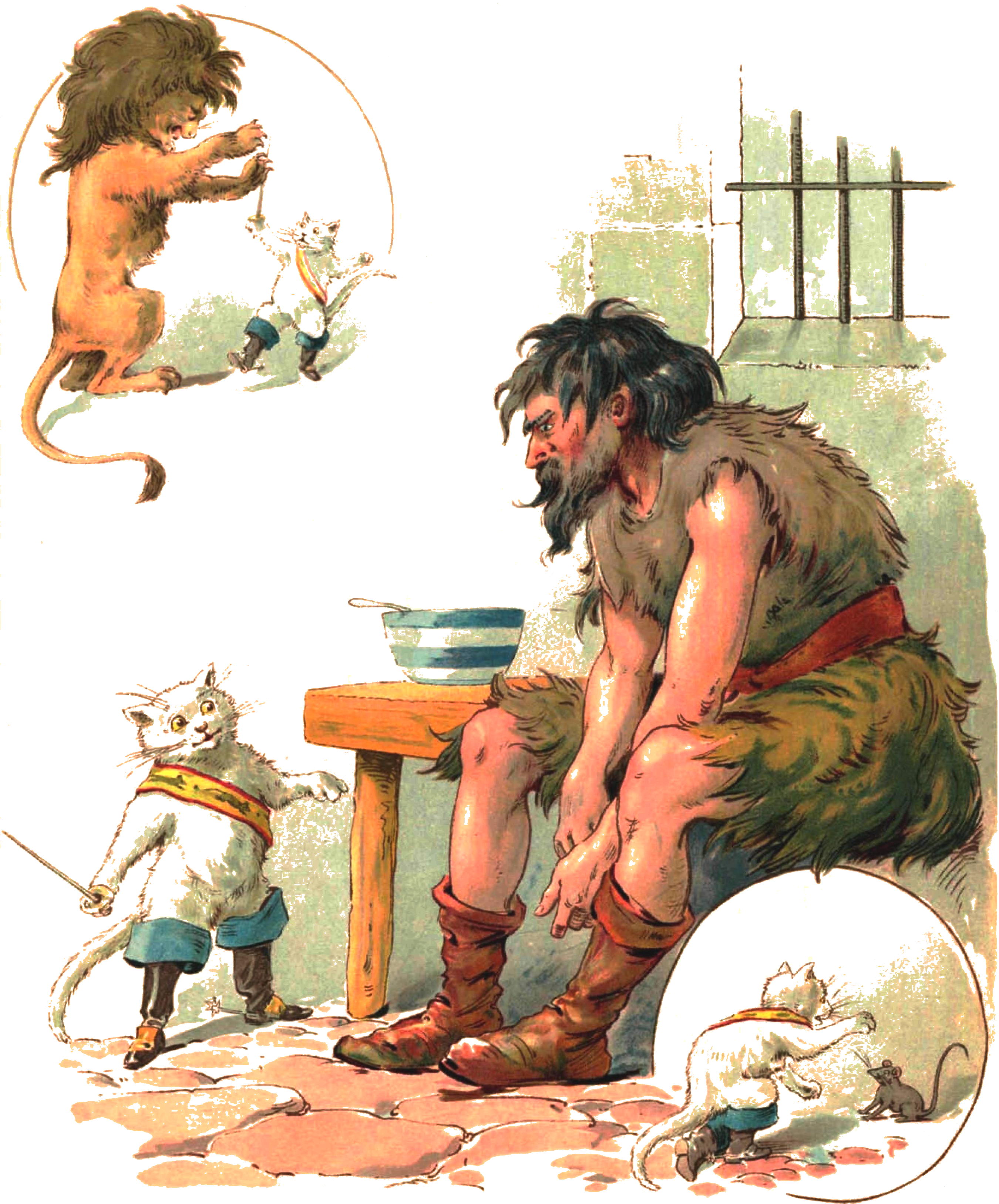 ilustracje do książki "Kot w butach" publikacja Księgarni Konstantego Trepte Warszawa 1900